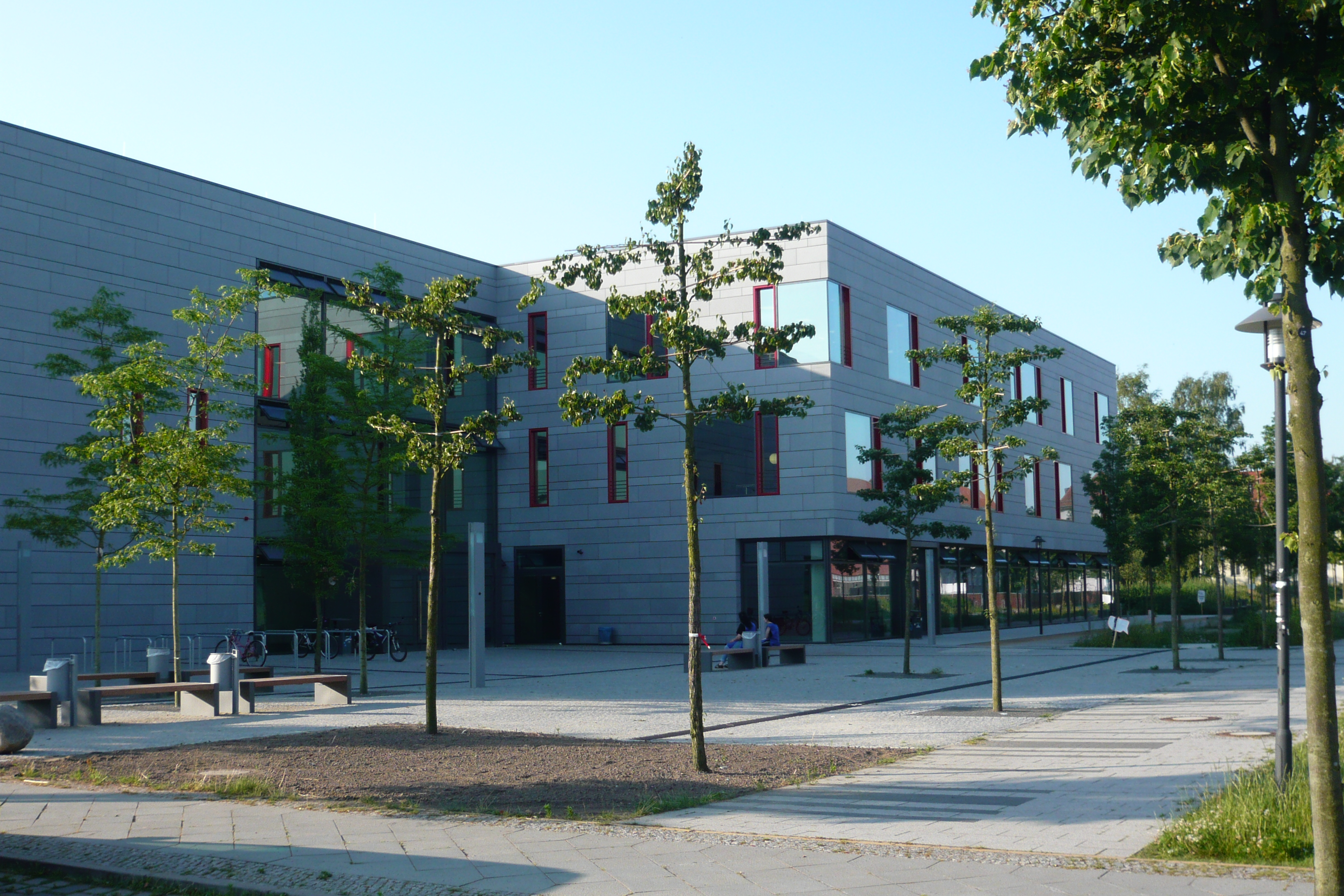 Hauptgebäude der FH Potsdam, Eingang zur Bibliothek